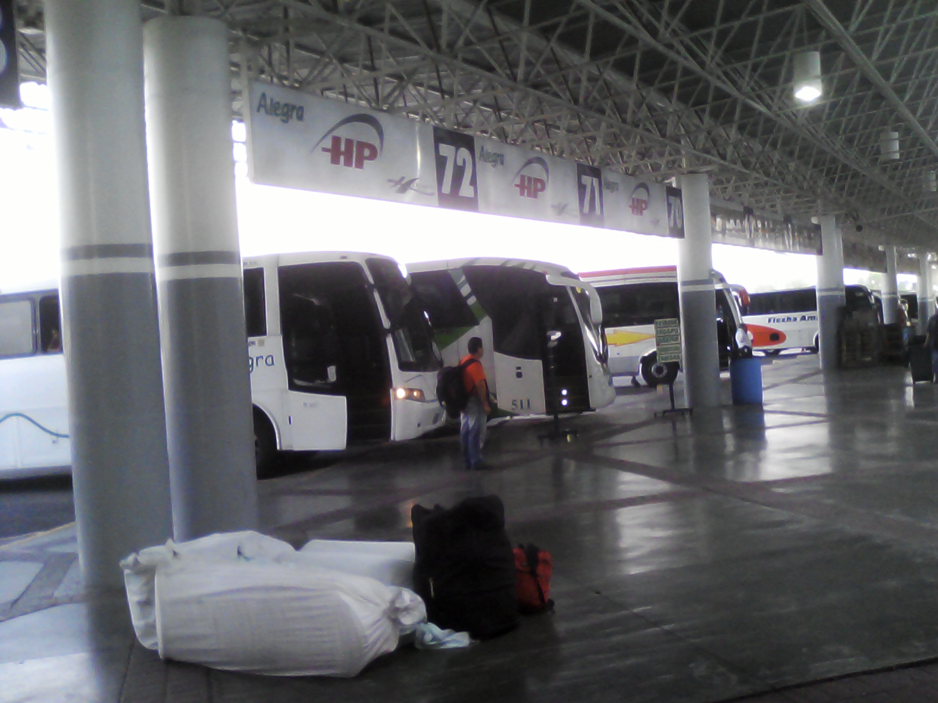 de la central de autobuses de Morelia